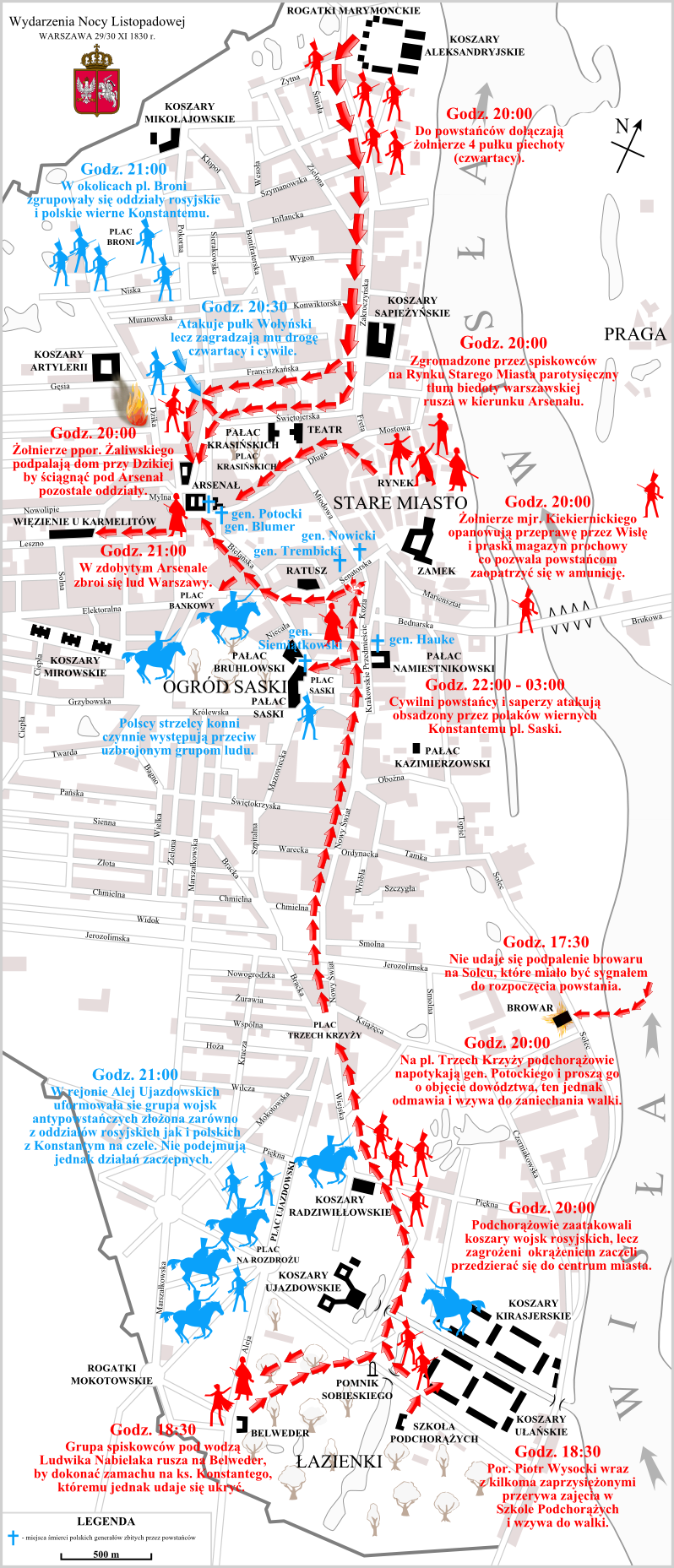 Wydarzenia nocy listopadowej 29/30 XI 1830